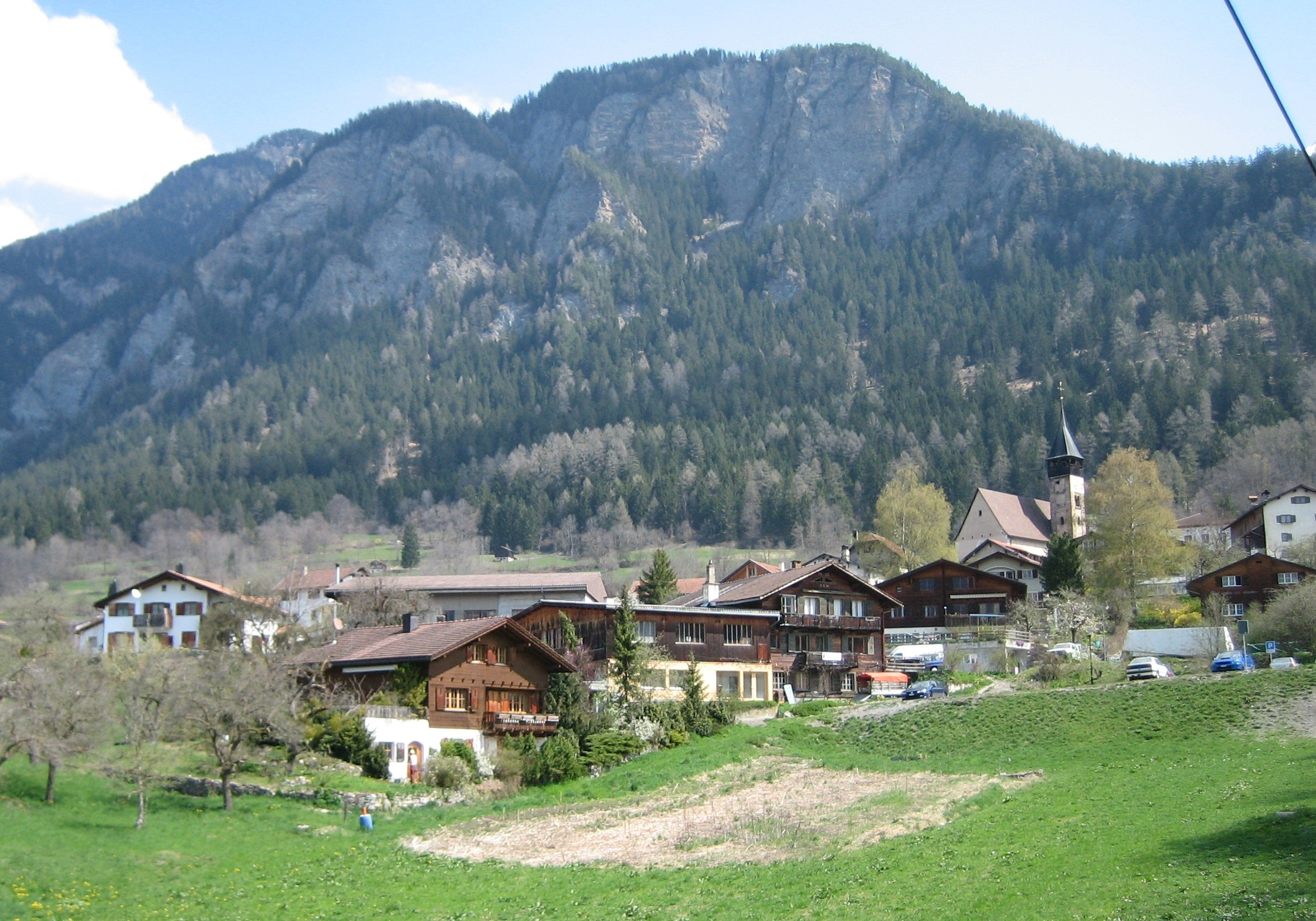 Scharans